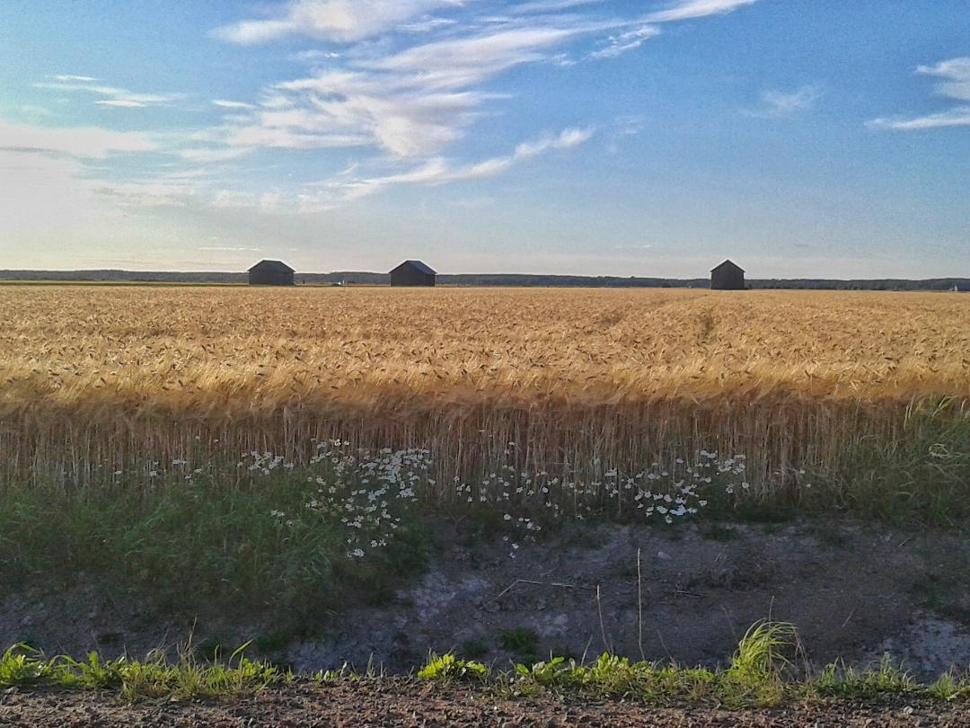 Söderfjärden, viljapelto